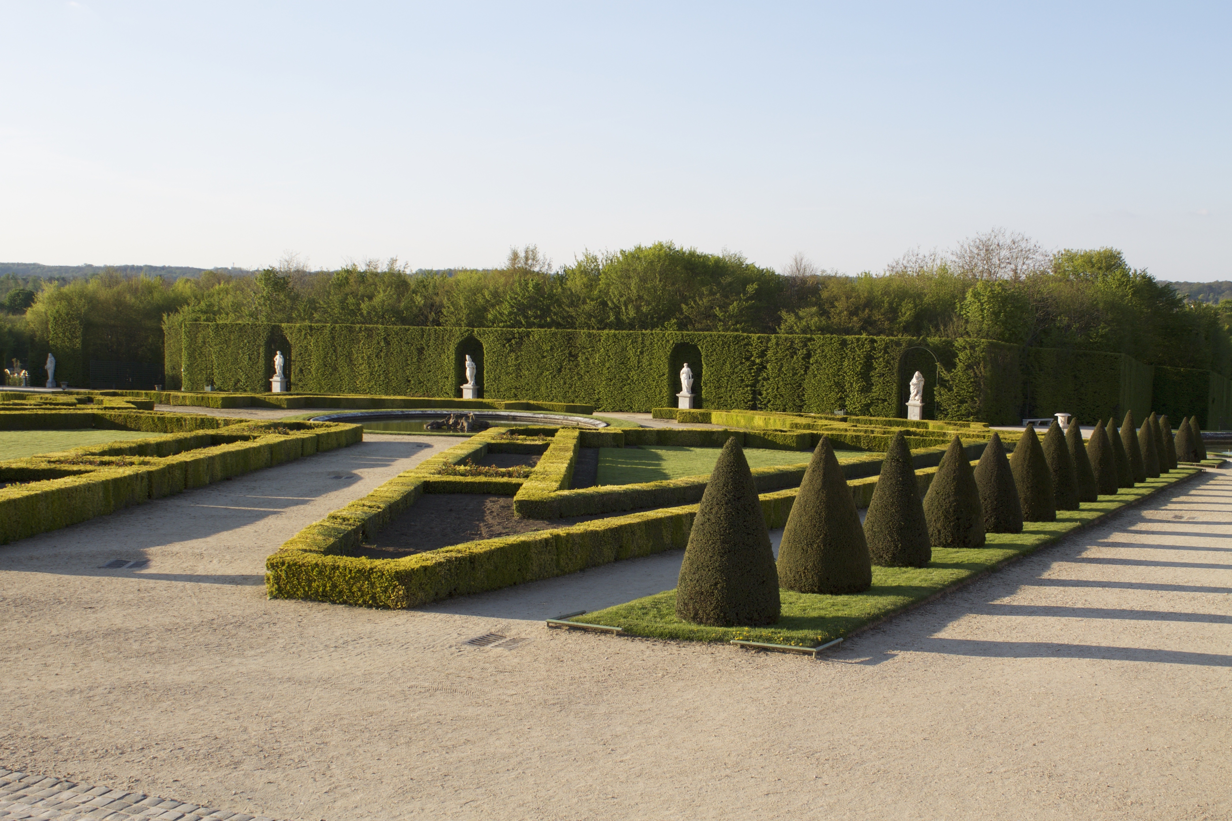 Versailles